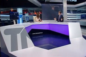 Pere Macias a Telemadrid